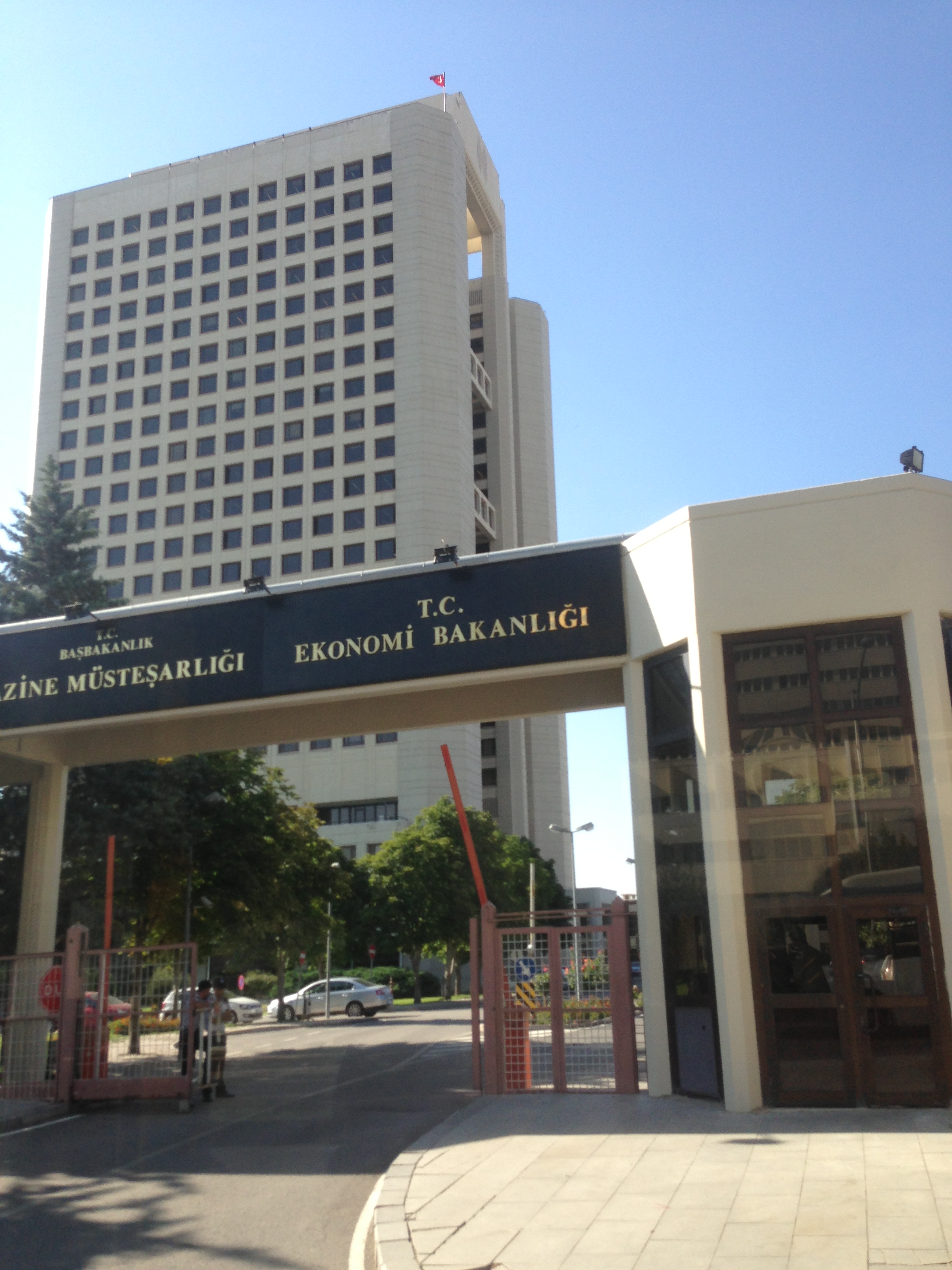 Ankara'da Ekonomi Bakanlığı ve Hazine Müsteşarlığı binası.